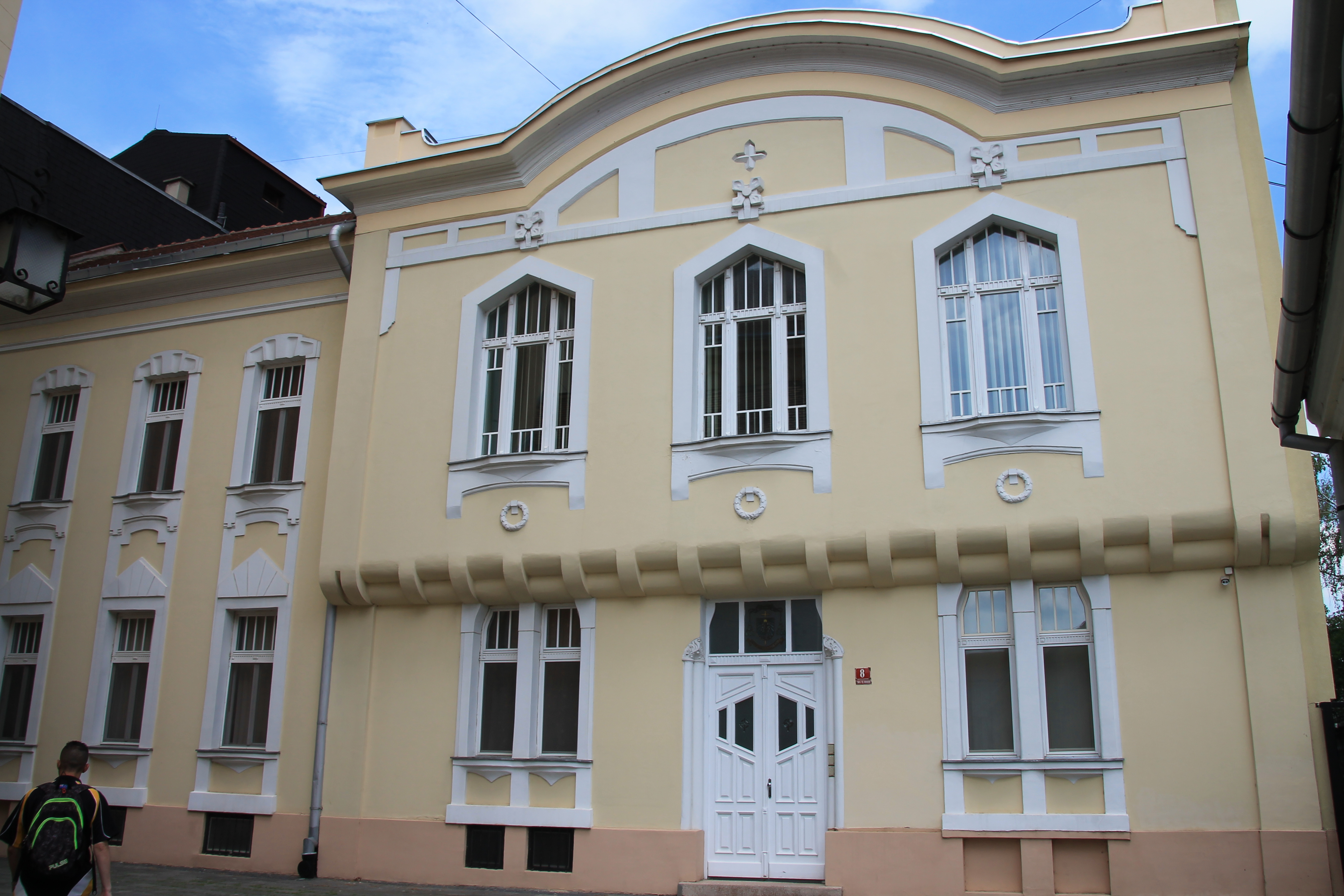 Staro jezgro Zrenjanina